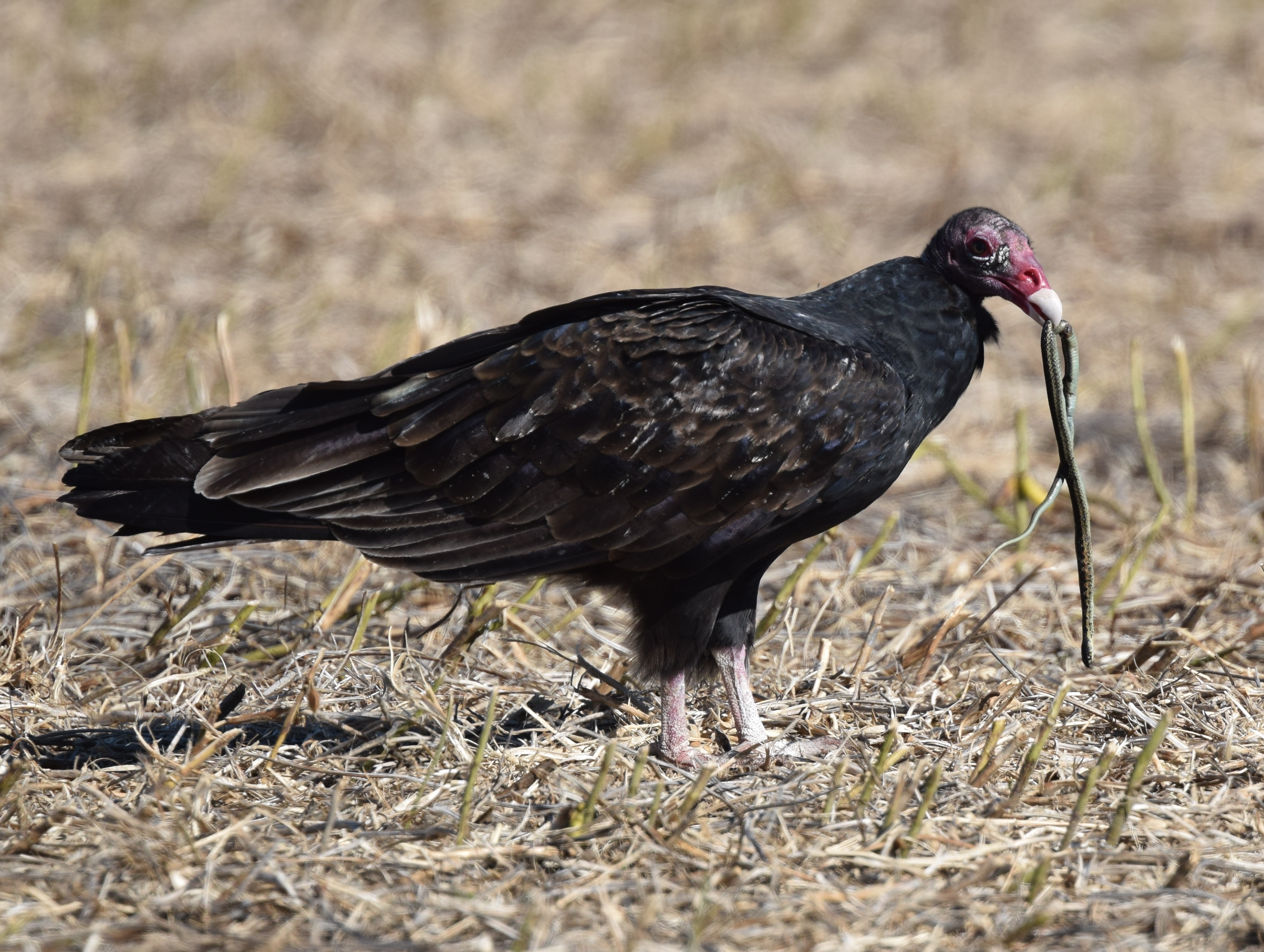 West Alton, MO 10/23/16